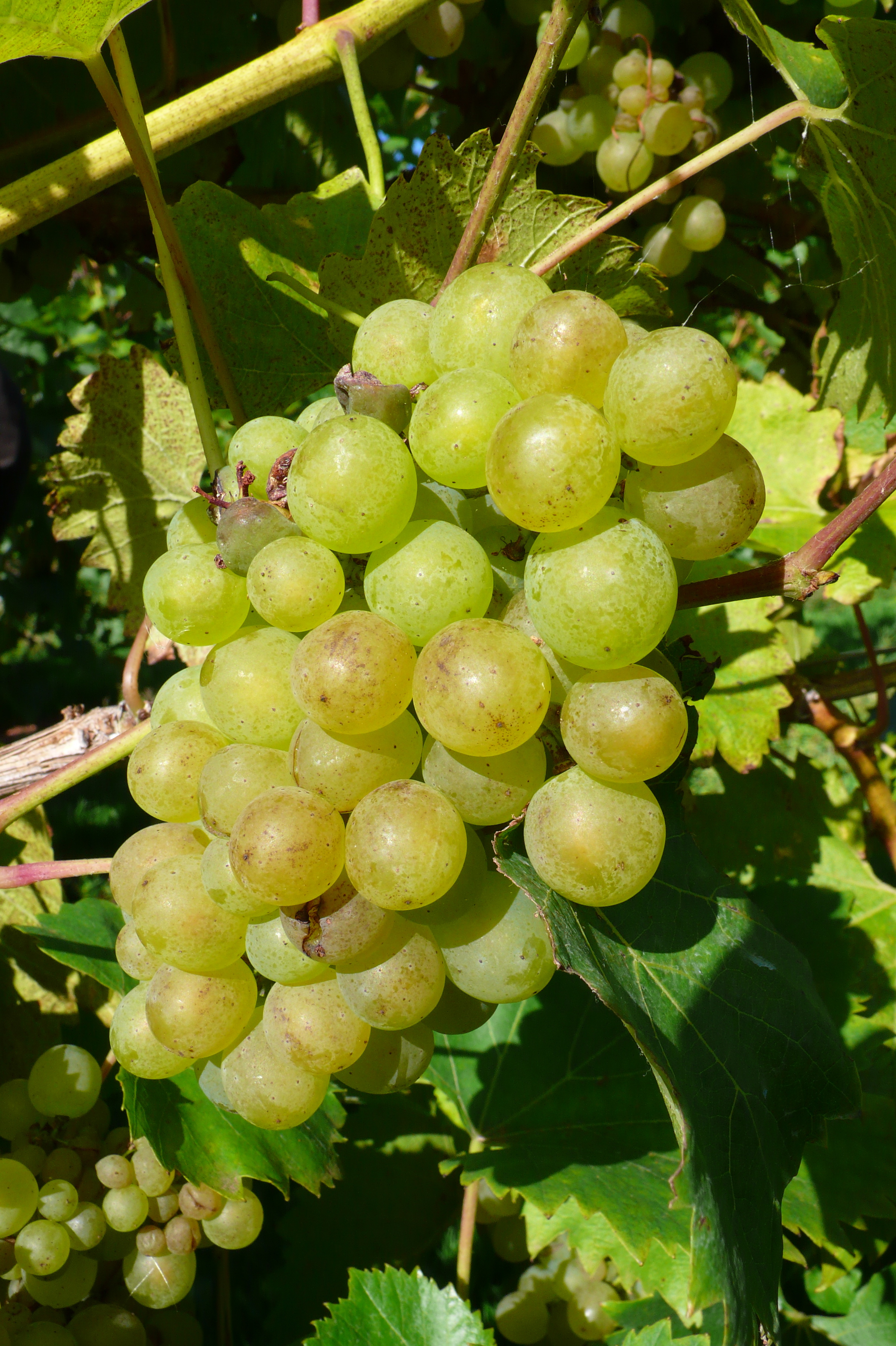 Madeleine Angevine growing in England